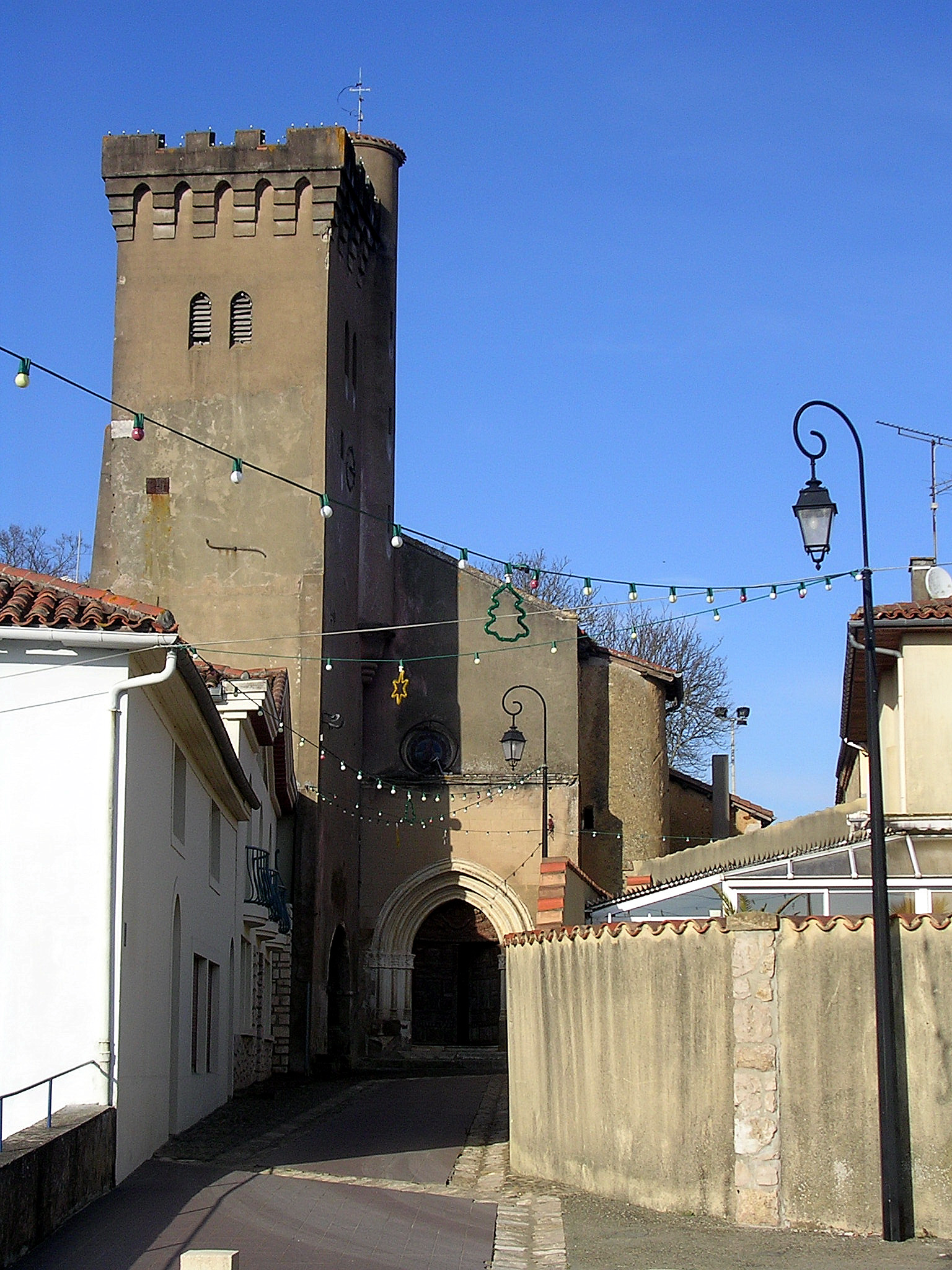 Eglise de Montaut, dans le département français des Landes